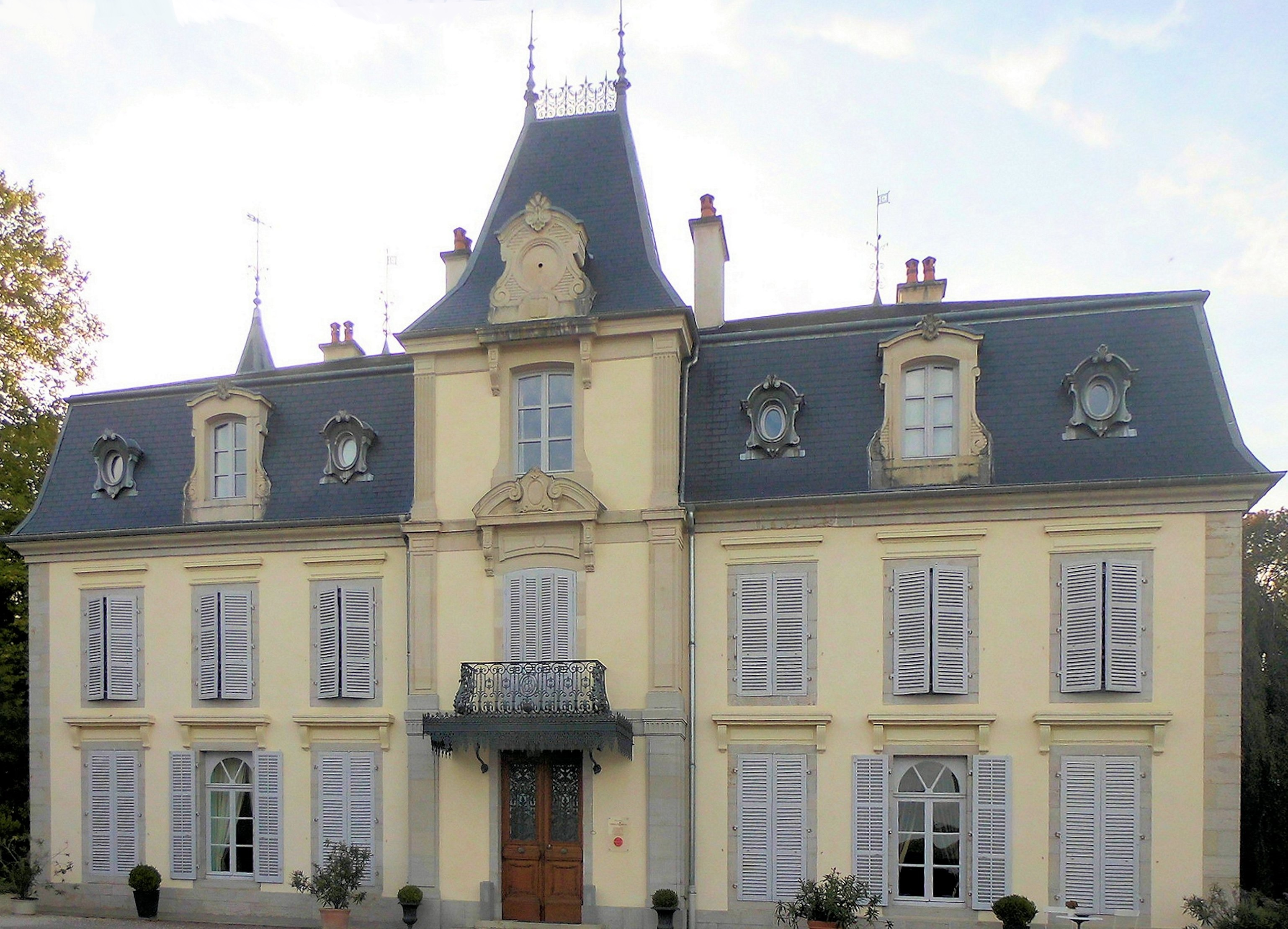 Le château d'Épinoux à Pusy-et-Épenoux